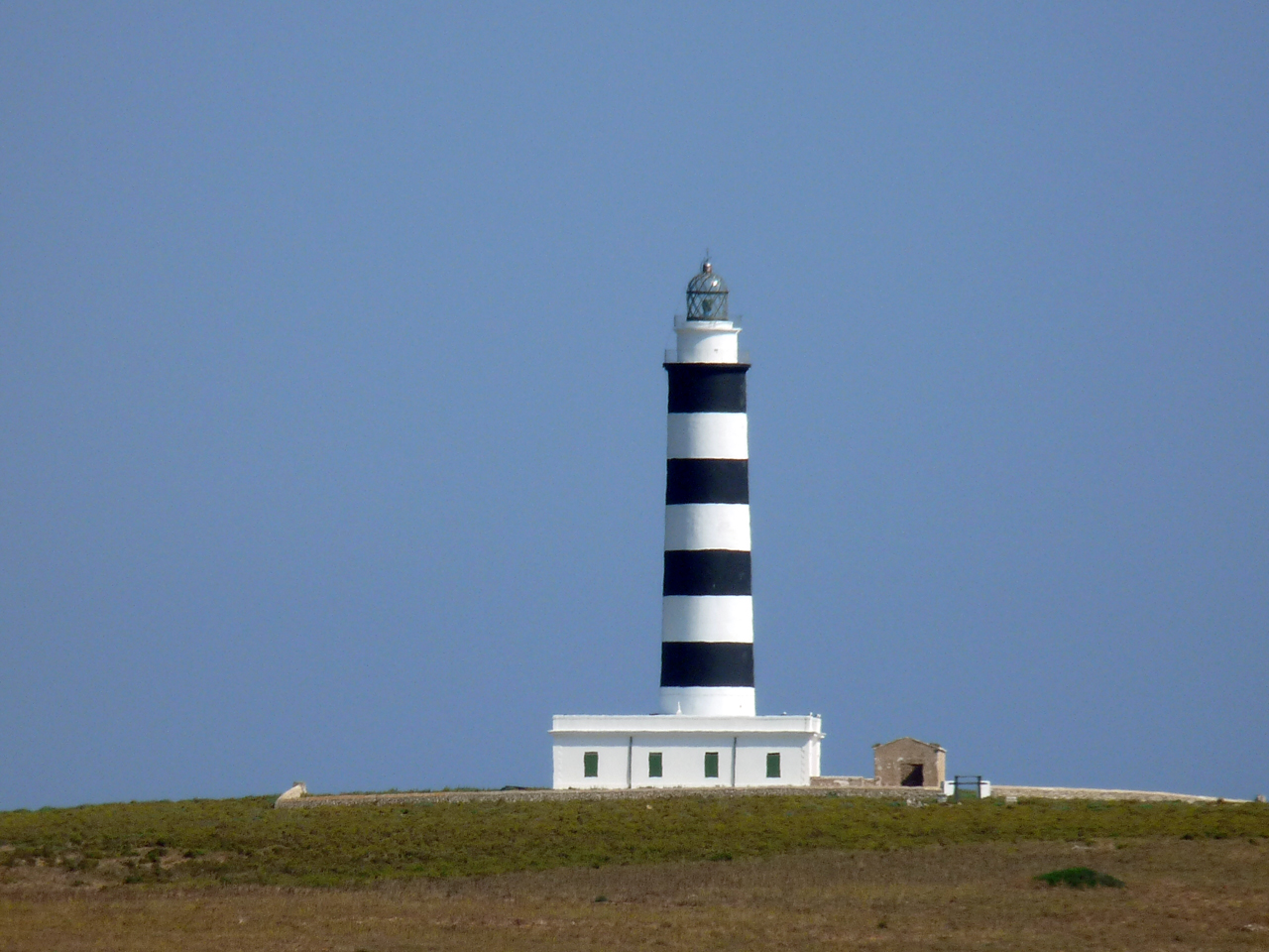 Faro de Illa de S'Aire (Isla del Aire, Punta Prima)